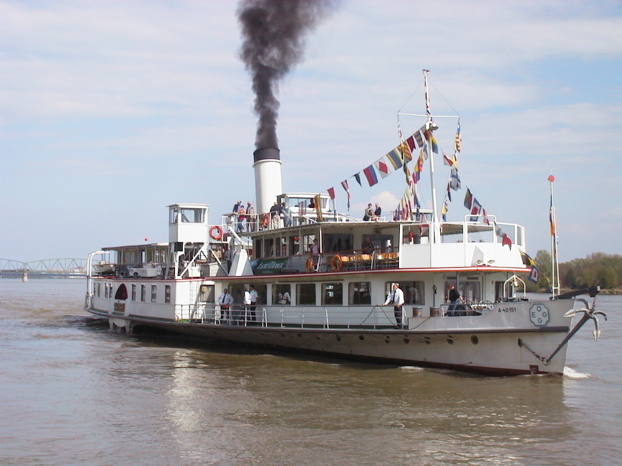 DDSG/ÖGEG-Dampschiff Schönbrunn in Krems/Stein